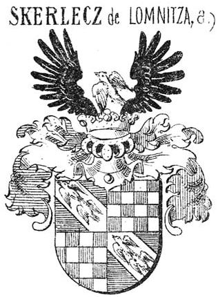 A lomniczai Skerlecz család köznemesi cimere Siebmacher könyvéből